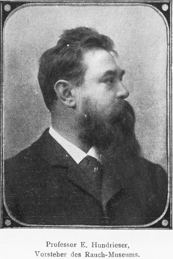 Emil Hundrieser (1846-1911),deutscher Bildhauer und Direktor des Berliner Rauch-Museums.